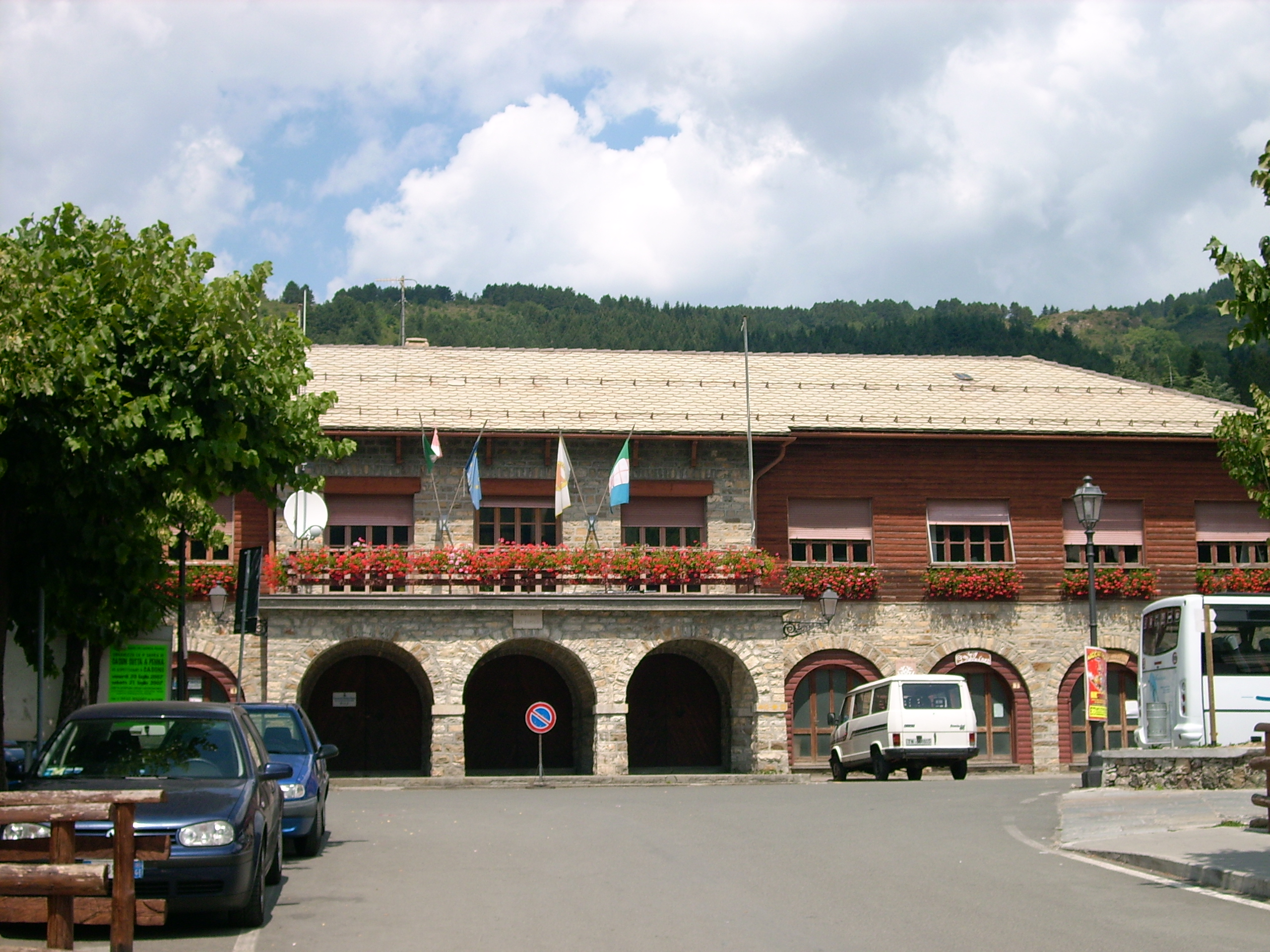 Municipio di Santo Stefano d'Aveto, Liguria, Italia